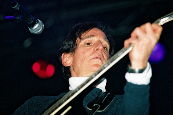 Alex Chilton-Live au Grand Mix de Tourcoing, France